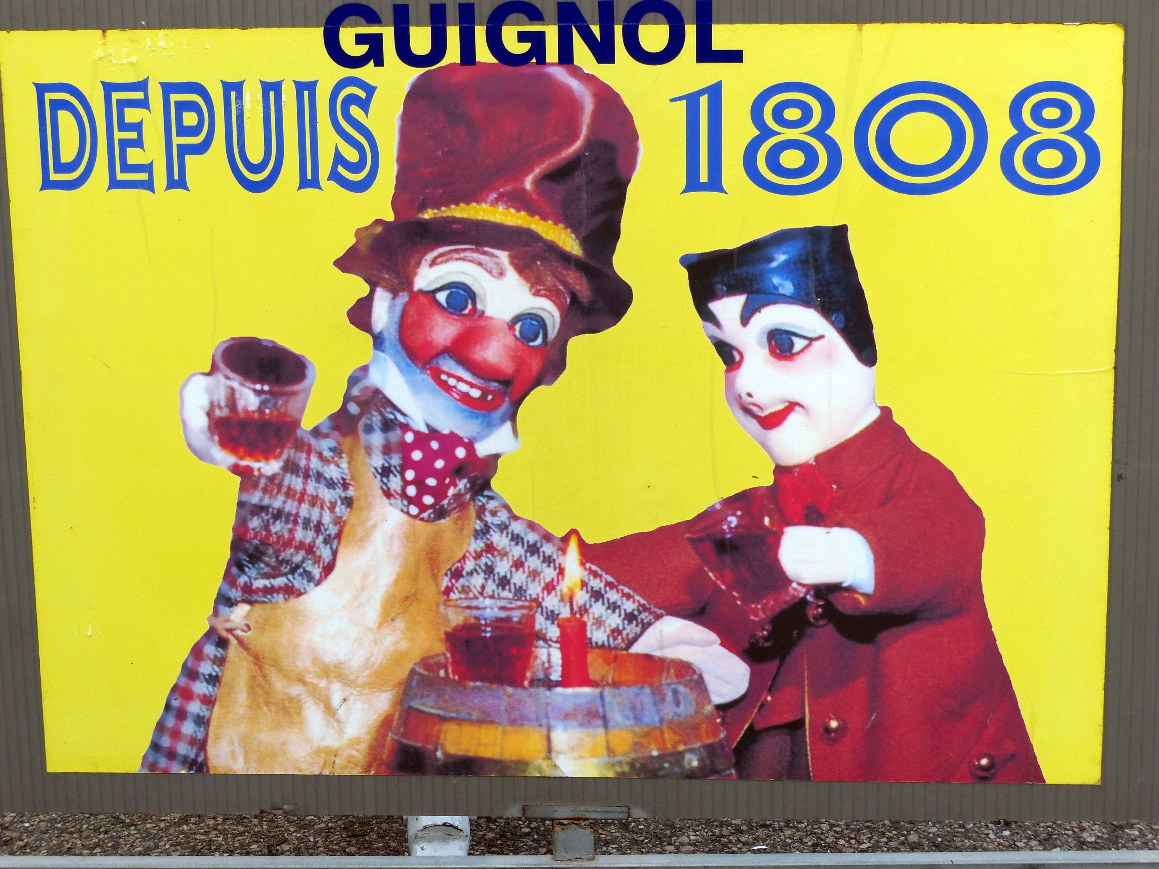 Theatre Guignol in Prévessin-Moëns - Plakate